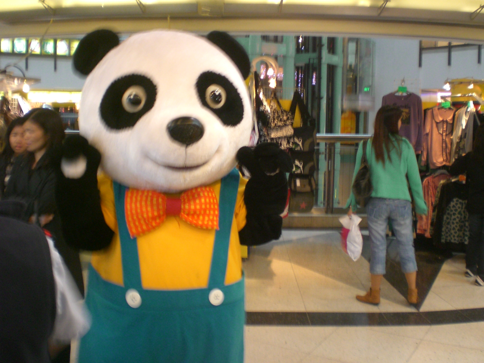 西九龍中心蘋果商場, Dragon Centre, Sham Shui Po, Kowloon, Hong Kong.